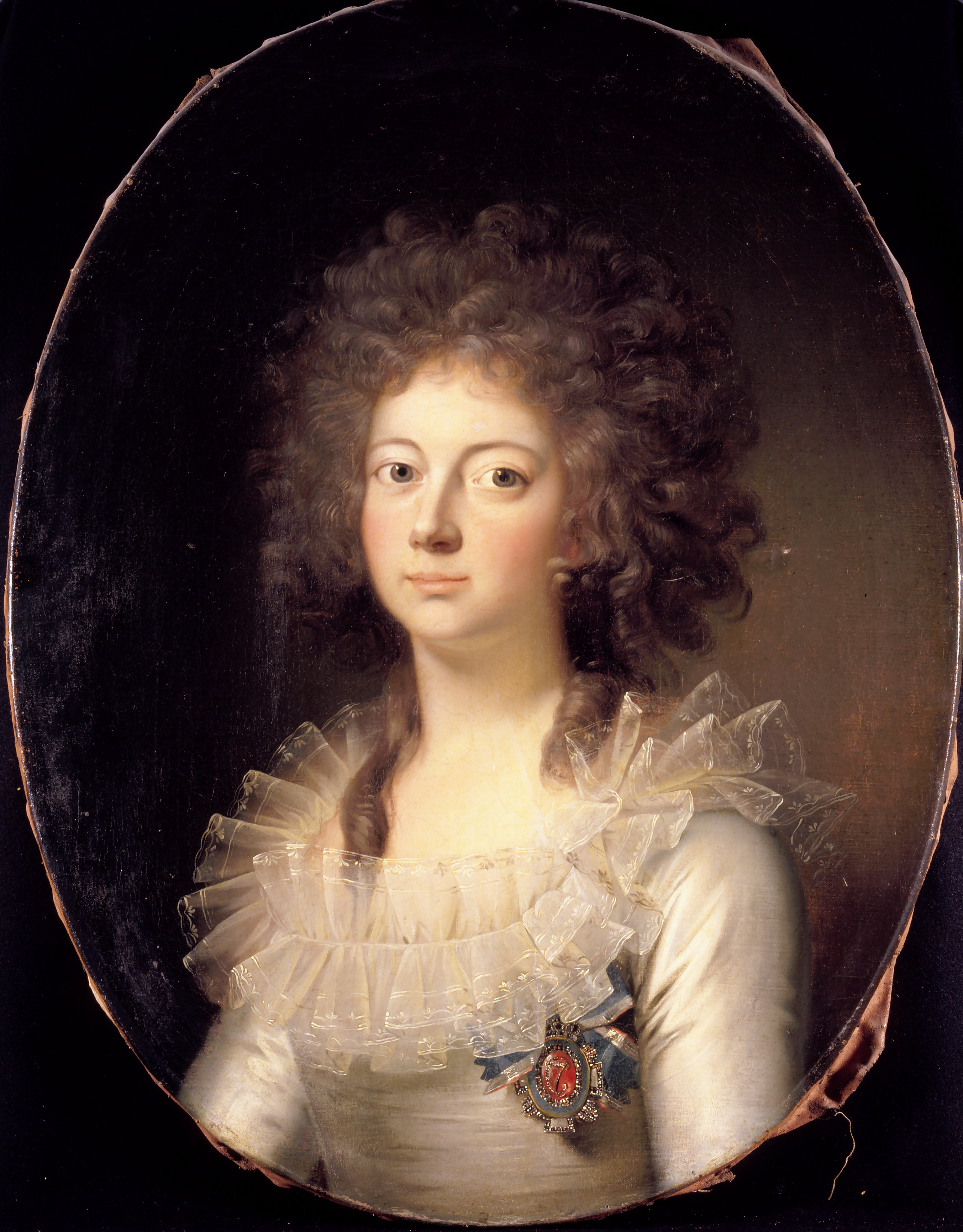 Portrait of Marie of Hesse-Kassel (1767-1852)label QS:Lda,"Marie Sophie von Hessen-Kassel, Königin von Dänemark"label QS:Len,"Portrait of Marie of Hesse-Kassel (1767-1852)"